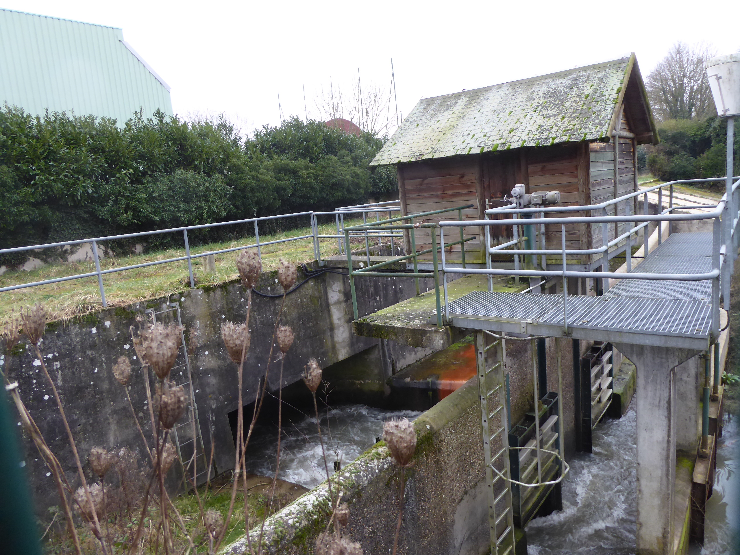 Entrée du bras naturel sous les tennis (parc de Vilgénis)